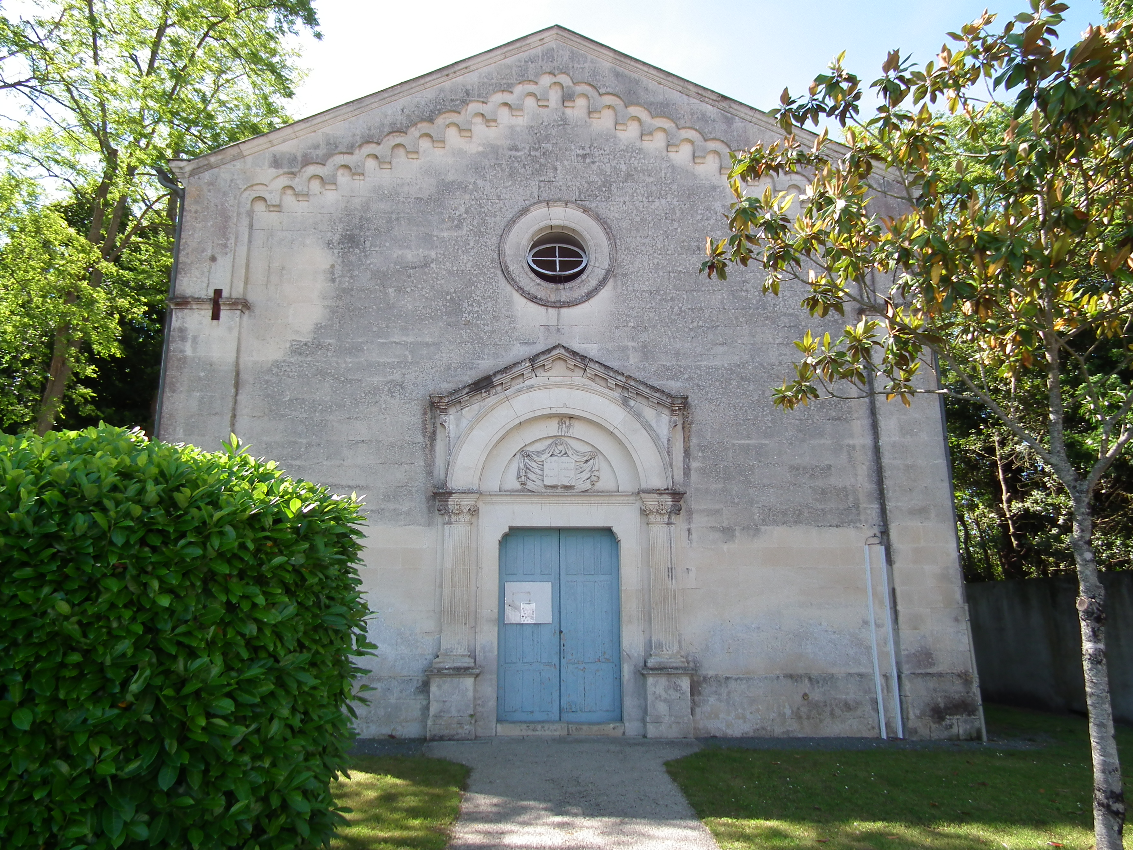 Temple d'Etaules